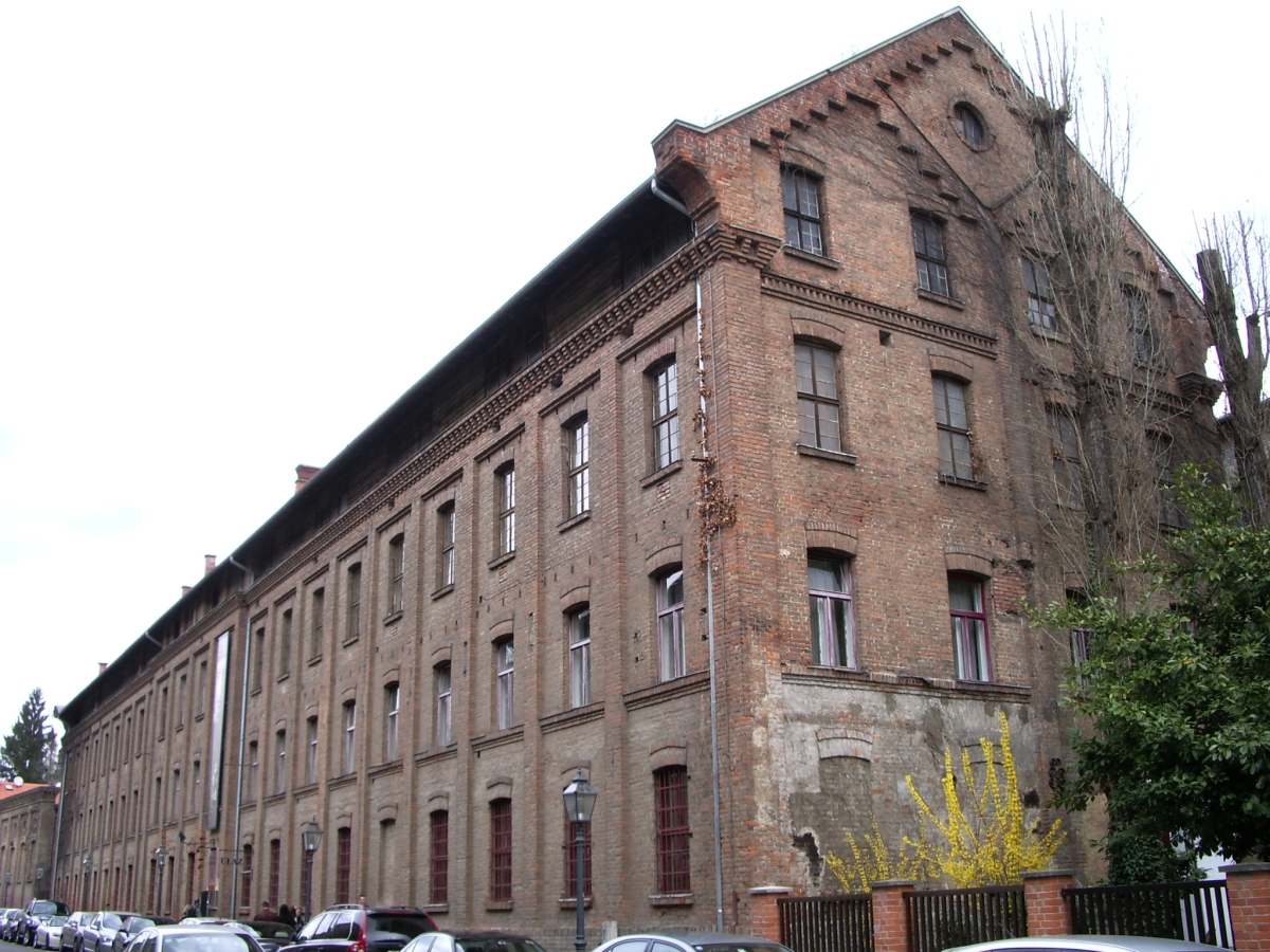 Zgrada Gliptoteke HAZU u Medvedgradskoj 2 u Zagrebu